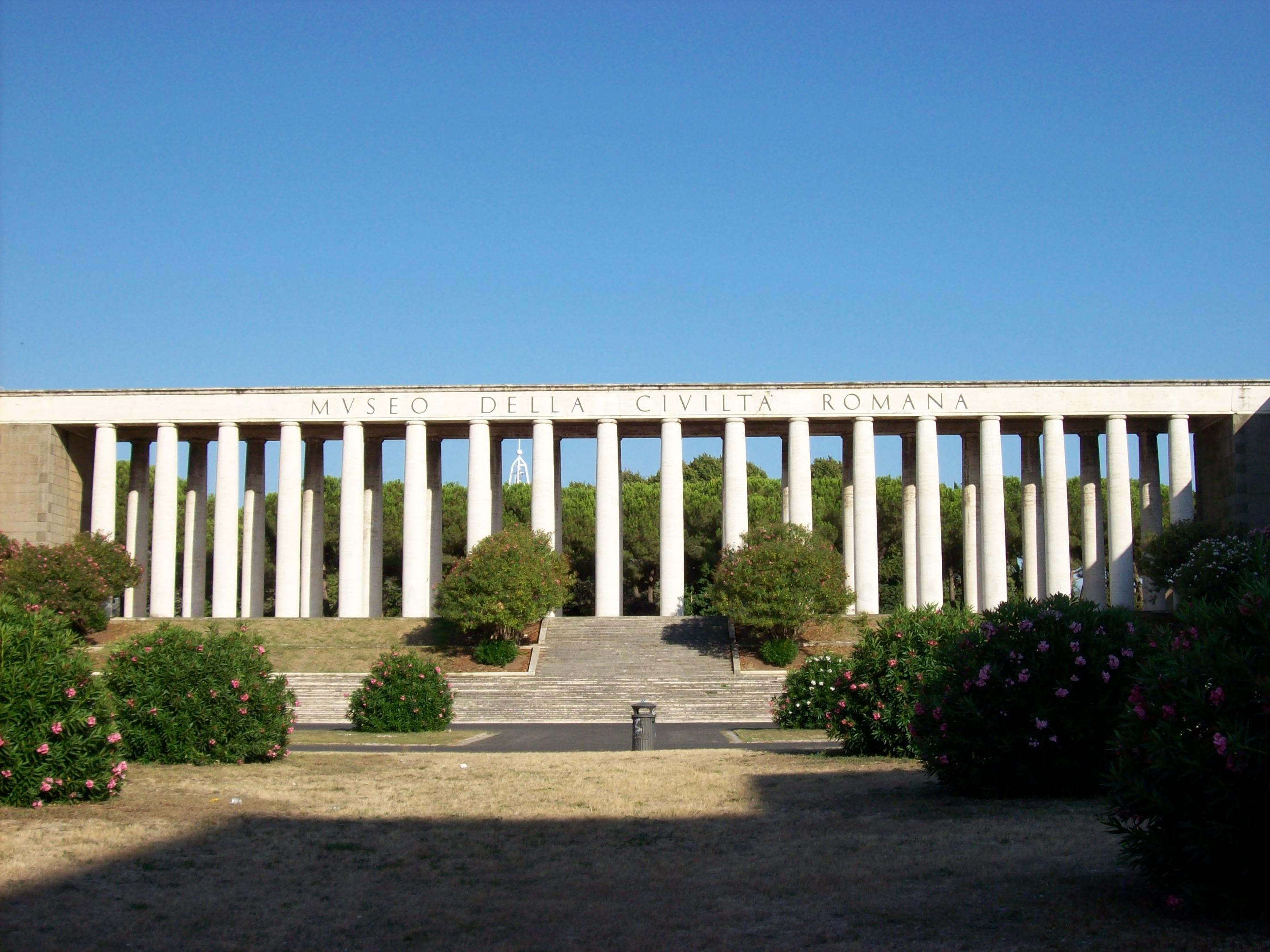 Il colonnato di fondo del museo della Civiltà Romana a Roma EUR